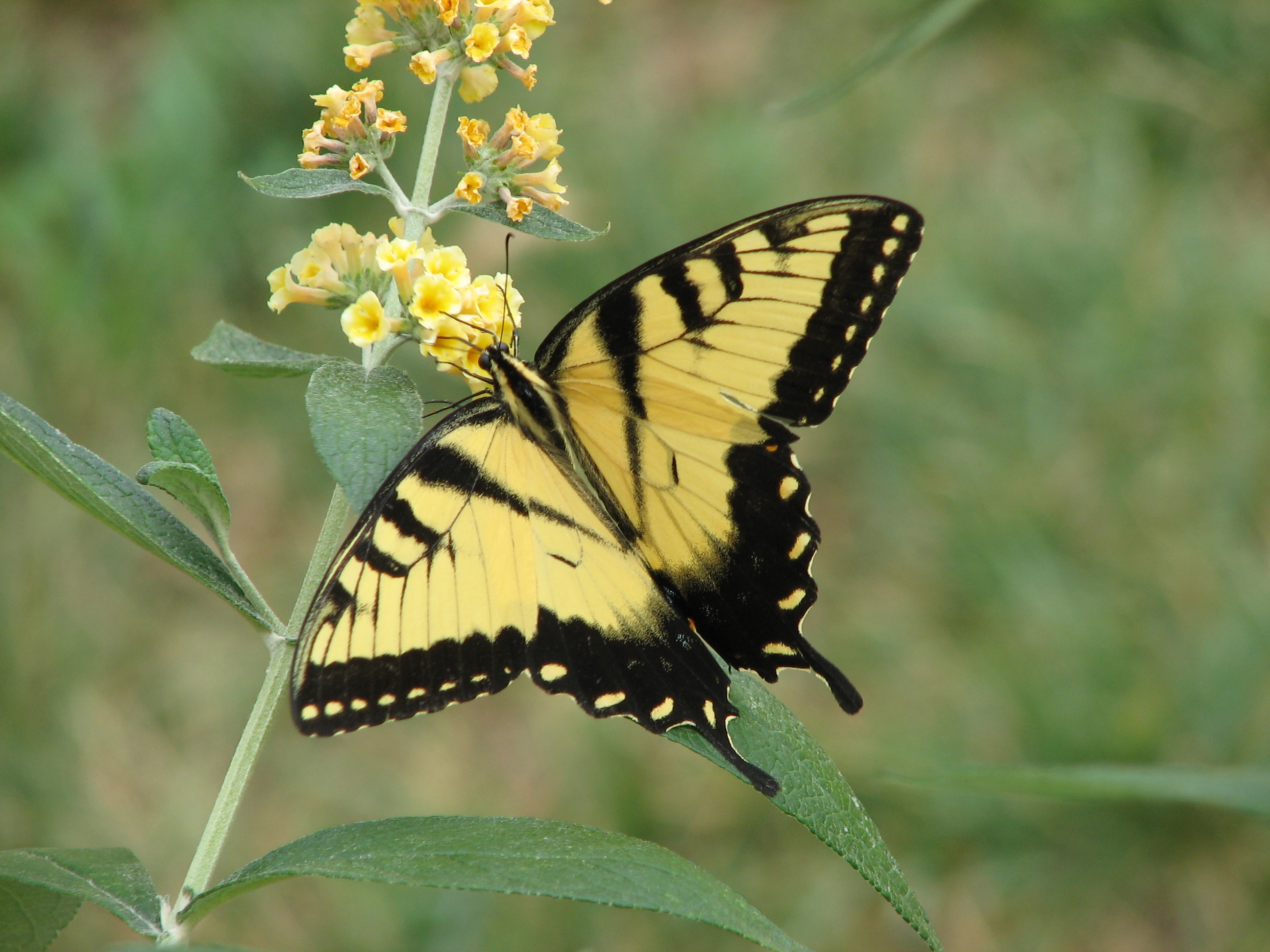 Swallowtail - Papilio glaucus - Taken in Louisville Kentucky